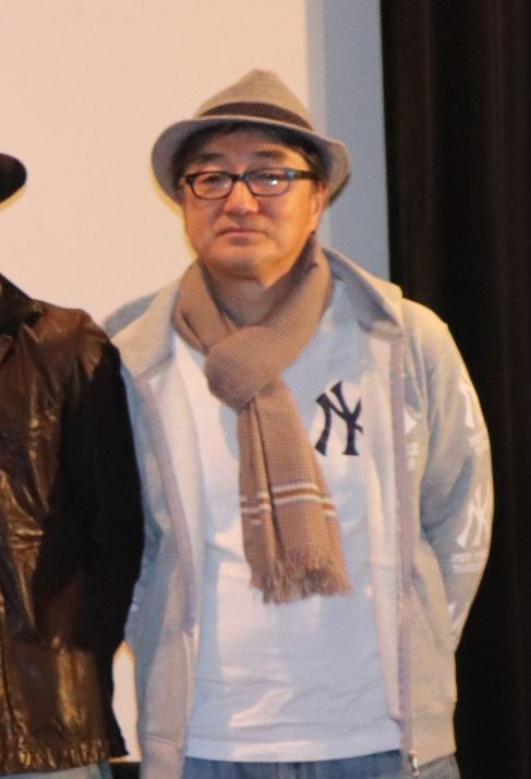 上野オークラ劇場「人妻の湿地帯 舌先に乱されて」舞台あいさつ 監督：工藤雅典